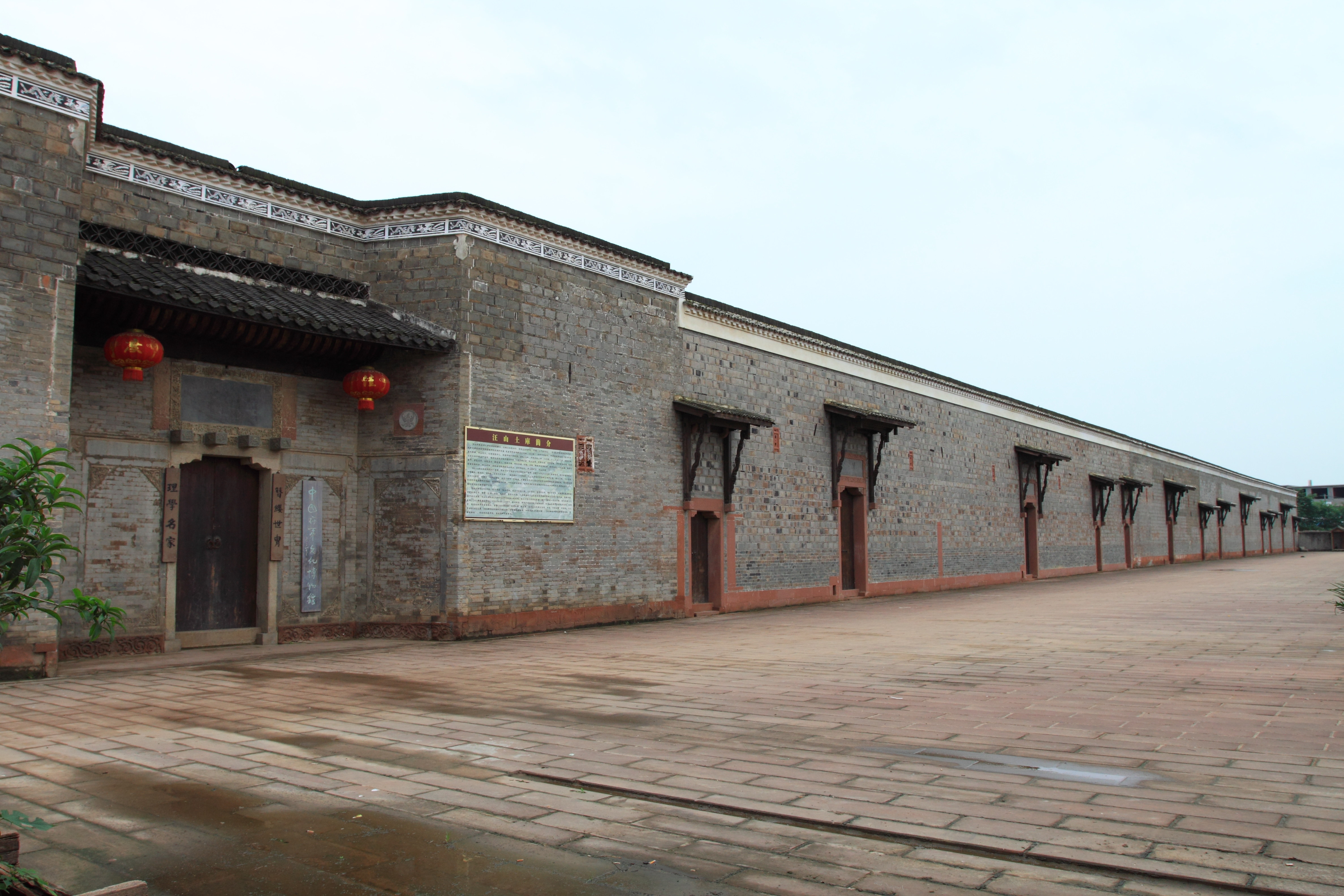 汪山土库，位于中国江西省新建县。